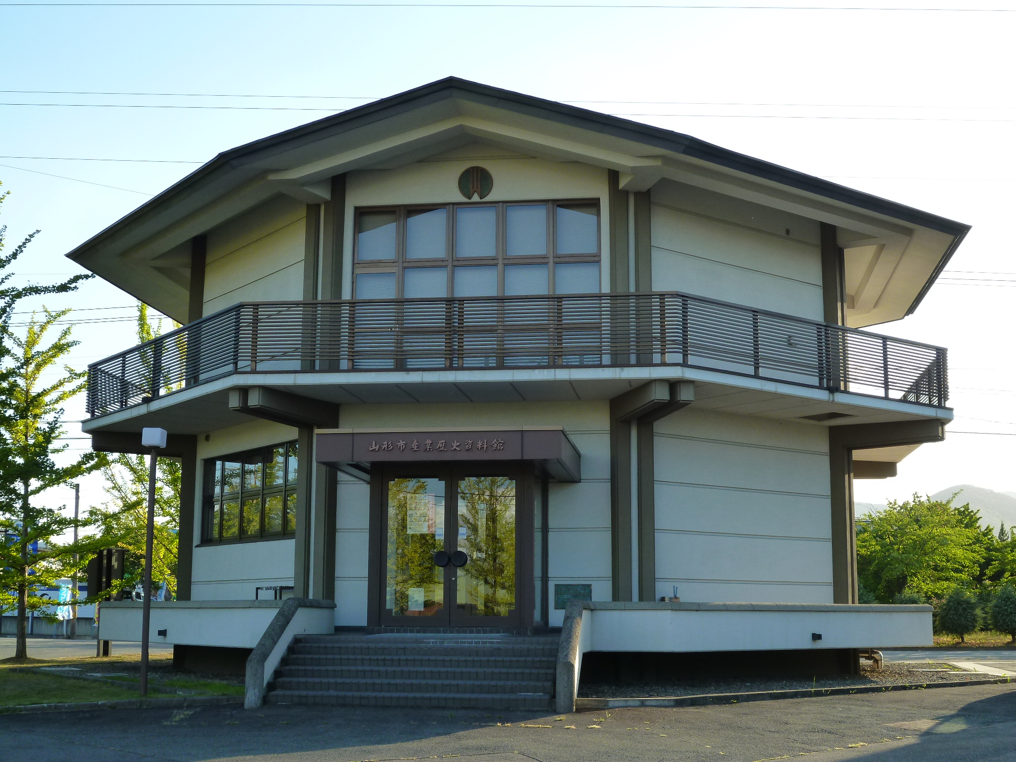 山形市産業歴史資料館（山形県山形市）